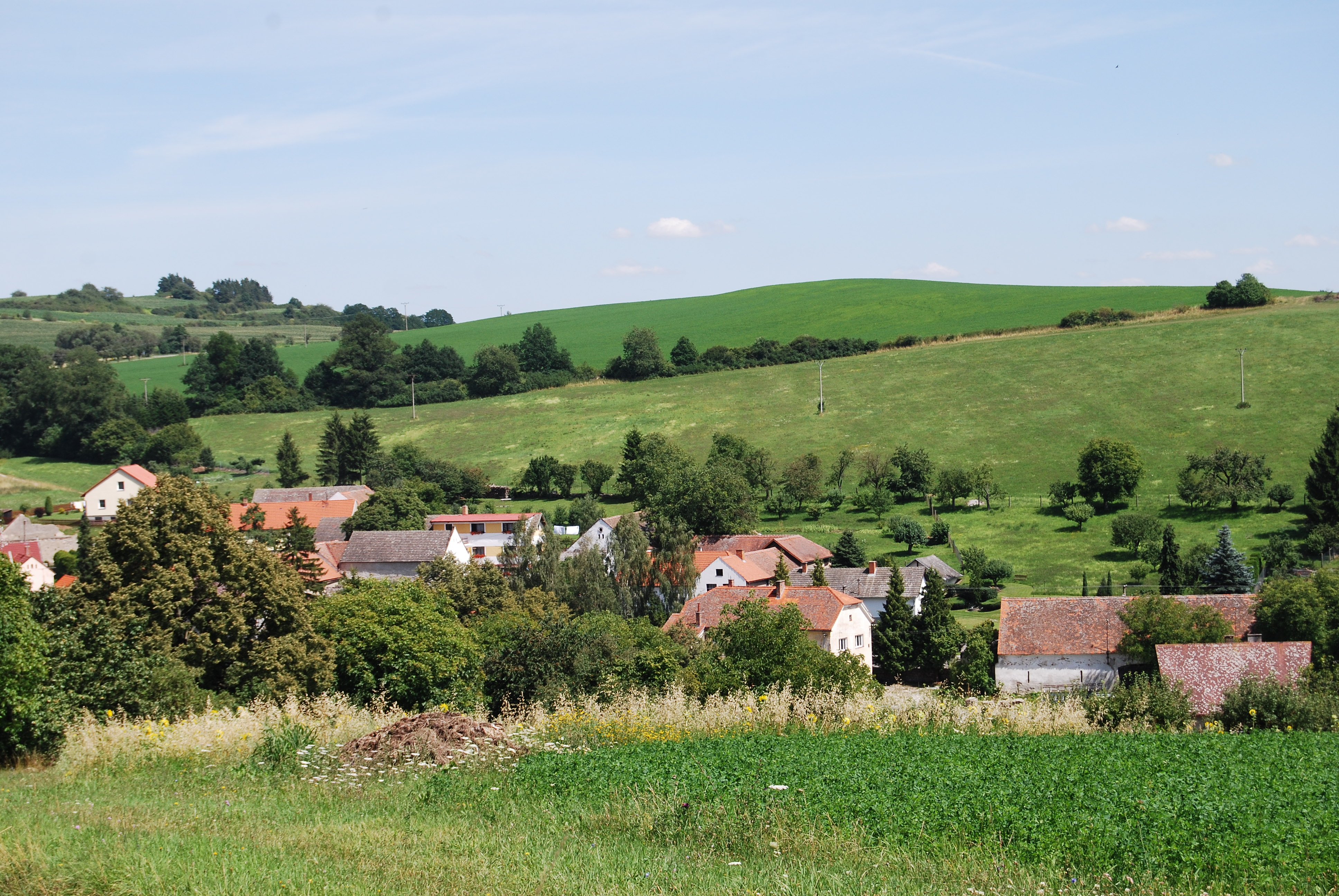 Pohled na část obce. Skoupý je malá část obce Petrovice v okrese Příbram. Česká republika.